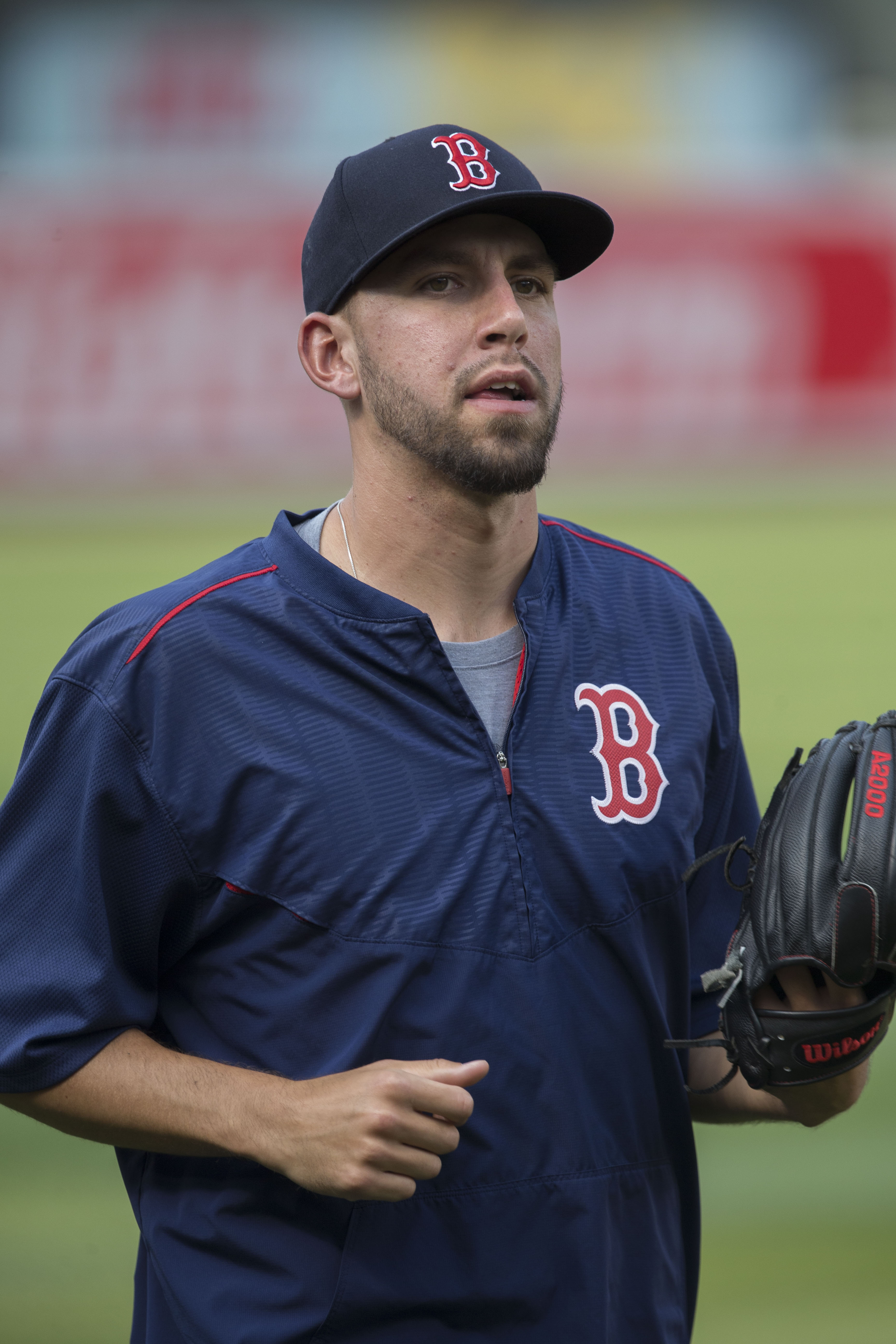 Matt Barnes